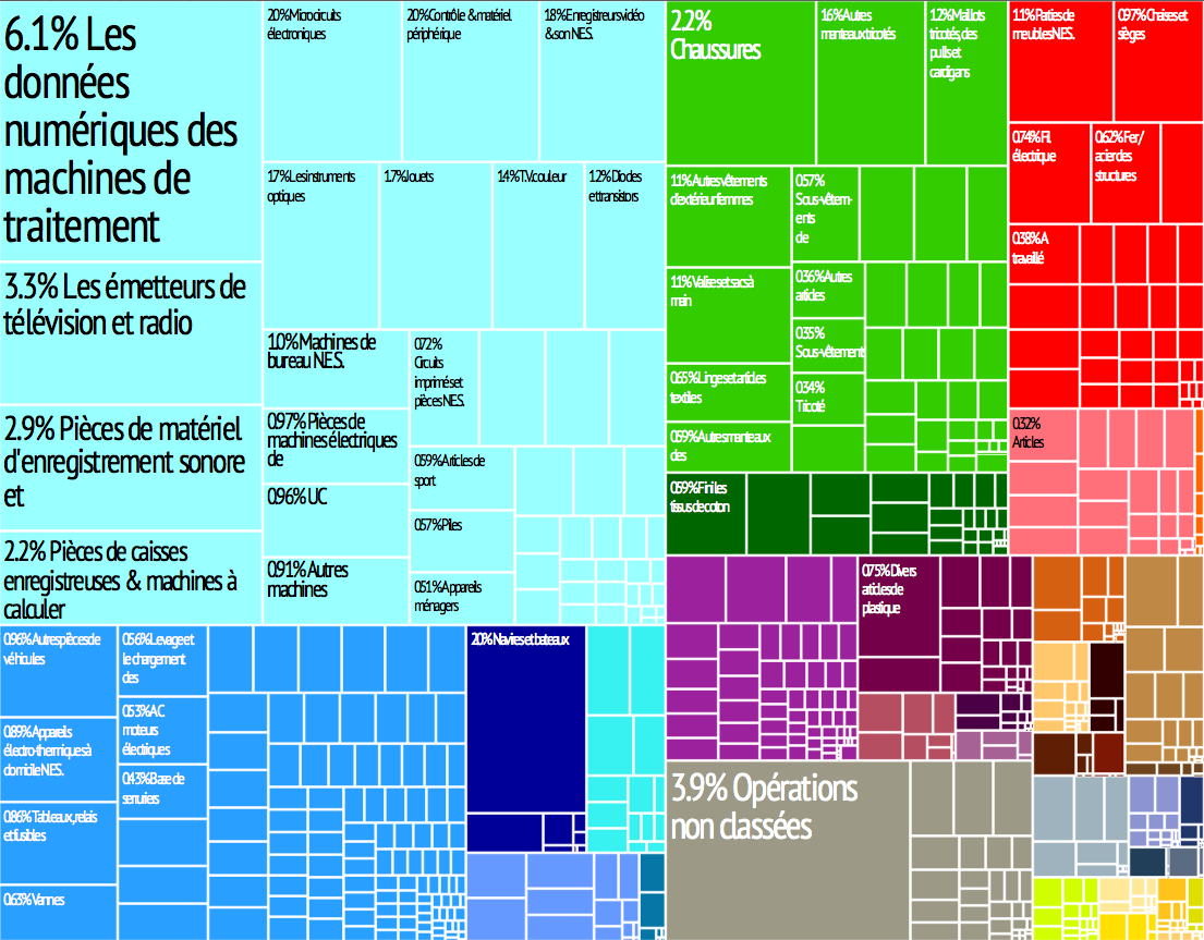 Représentation graphique des exportations de produits du pays dans 28 catégories de couleur. Chaque case de couleur représente un produit et sa taille est proportionnelle à la part des exportations totales du pays que le produit représente.